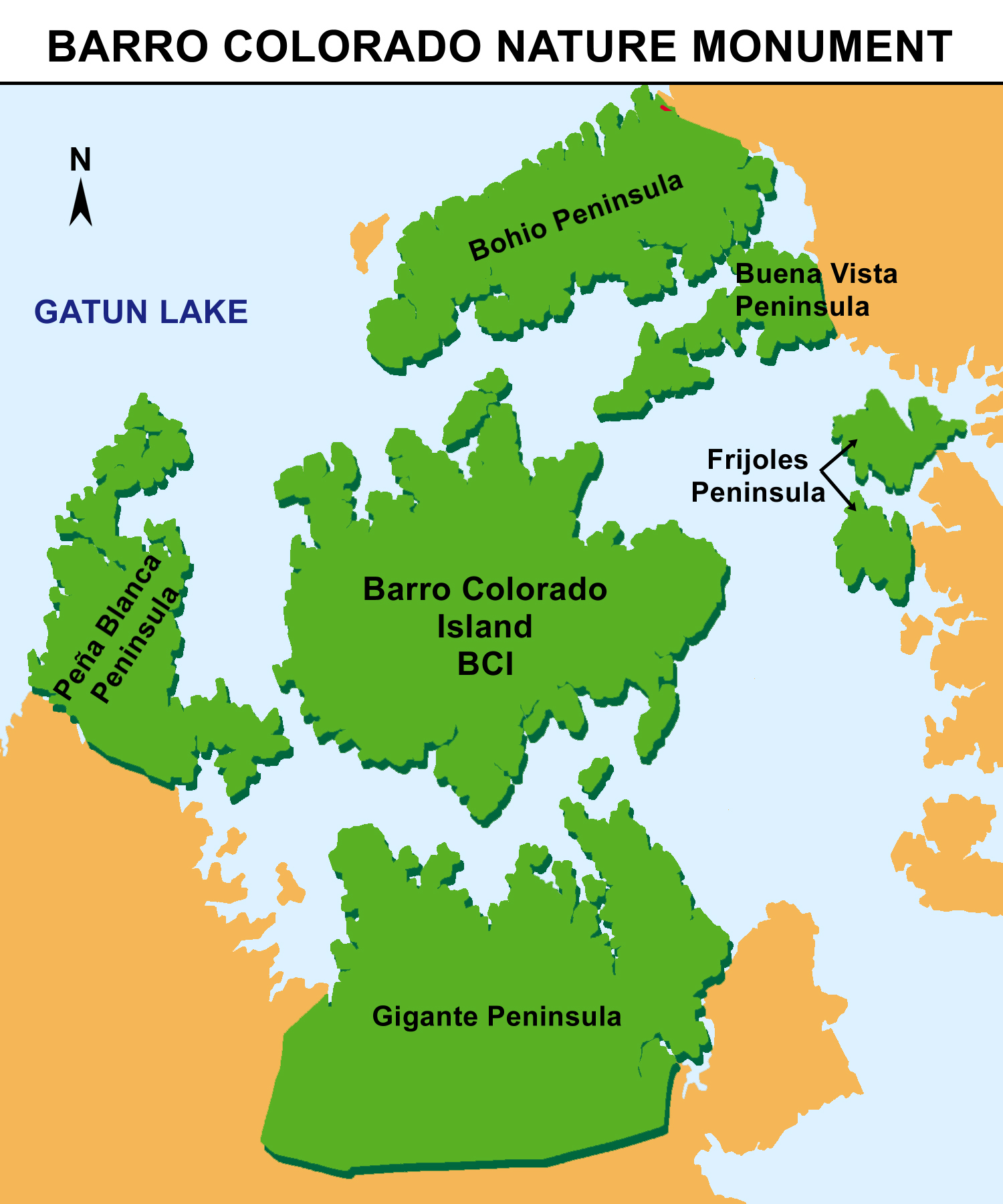 Barro Colorado Island (BCI) and Barro Colorado Natural Monument (BCNM)